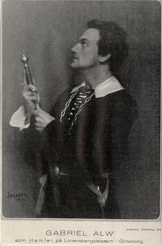 Gabriel Alw som Hamlet 1920, Lorensbergsteatern, fotograf Aron Jonason, GSM